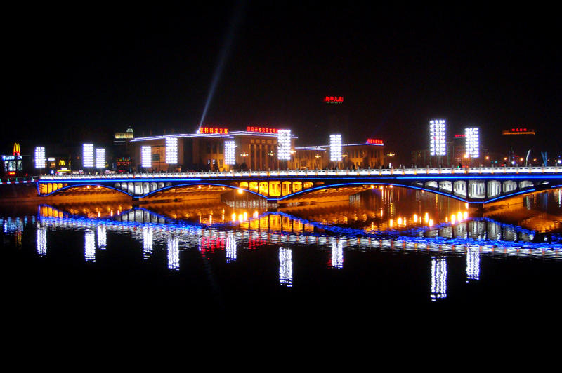 河北省张家口市清水河上桥梁之通桥。